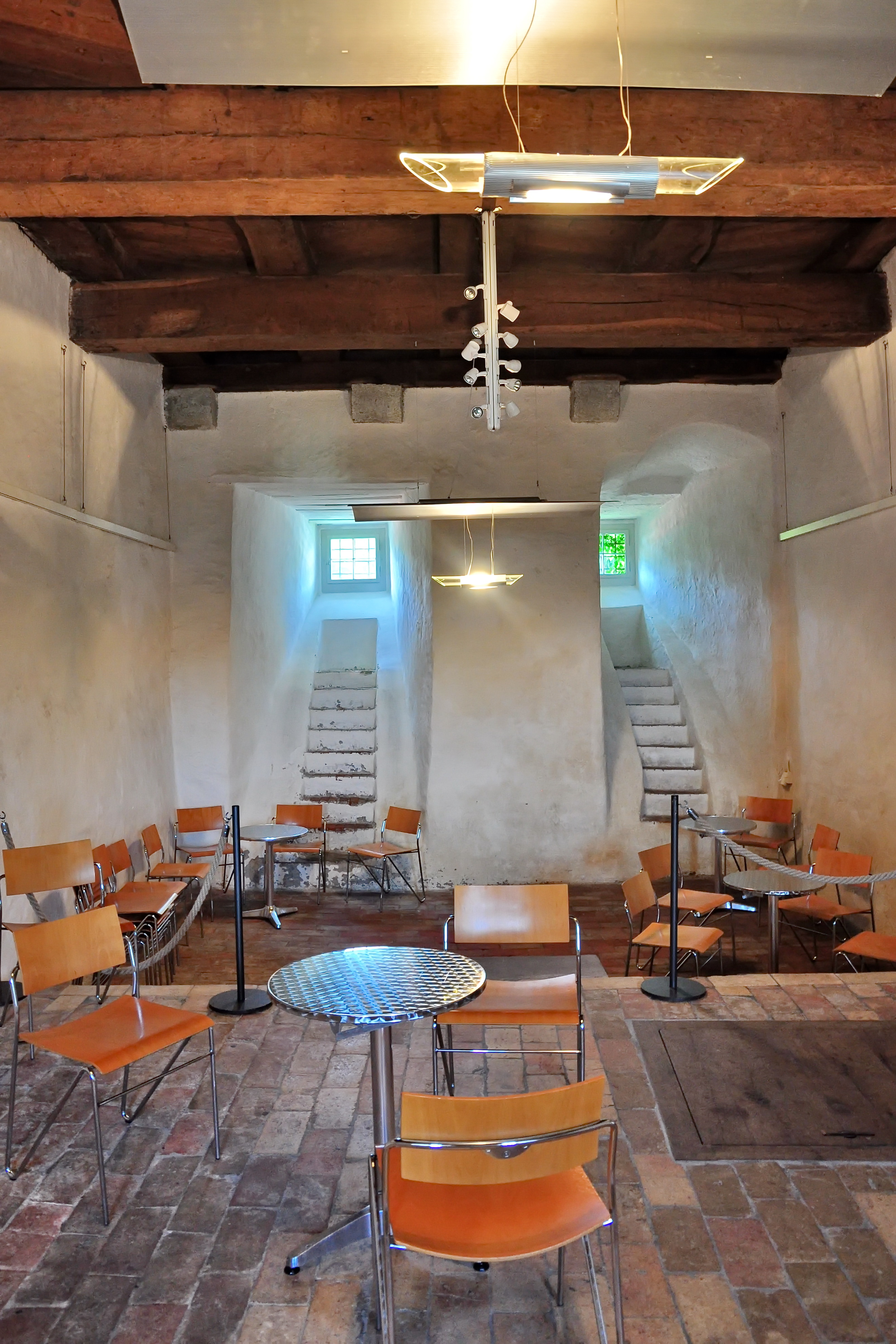 Schloss in Greifensee (Switzerland)